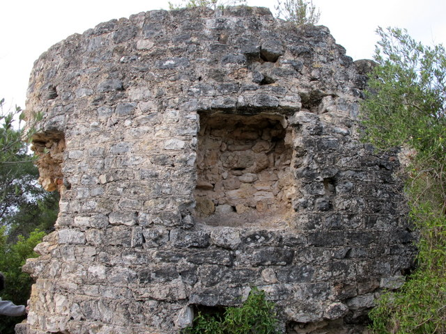 Castell de Montoliu o Castellot o de Santa Margarida, LaRiera de Gaià, Tarragonés, Catalunya